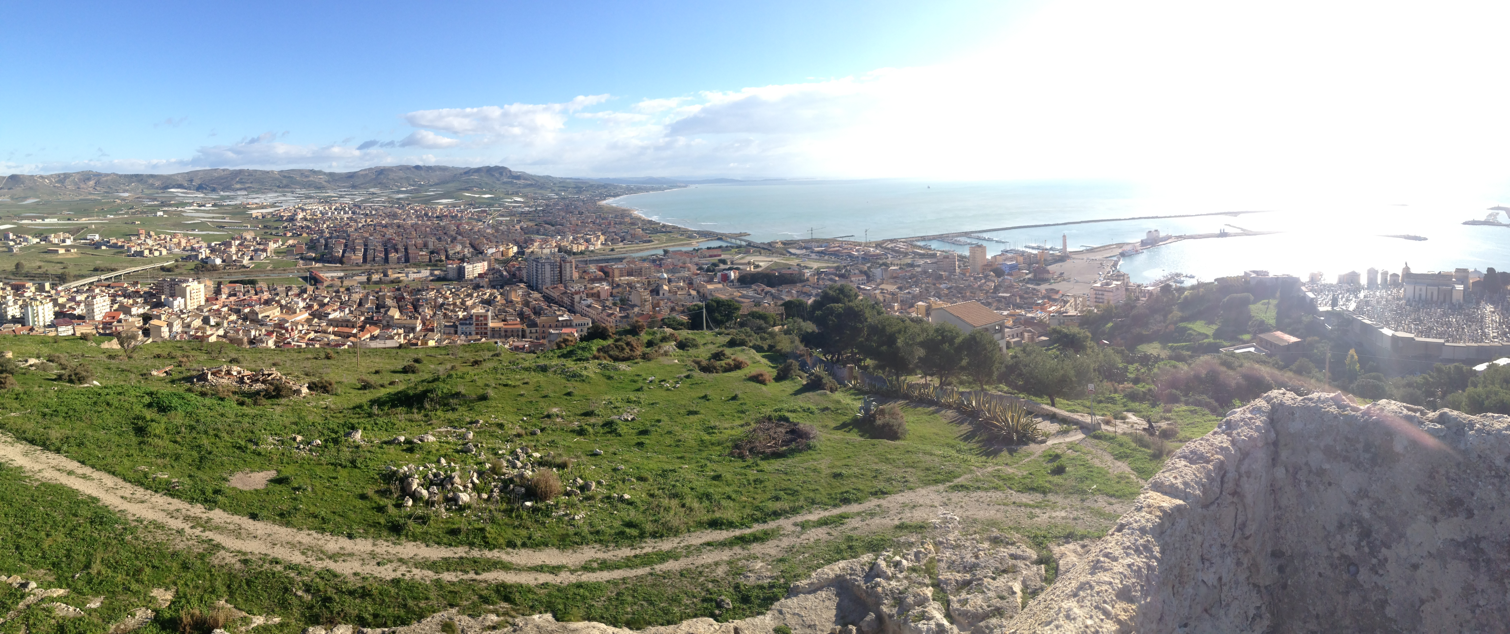 Panorama di Licata dal Castello